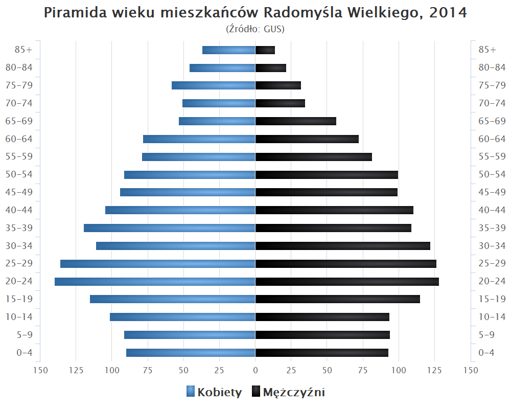 Piramida wieku mieszkańców Radomyśla Wielkiego, 2014